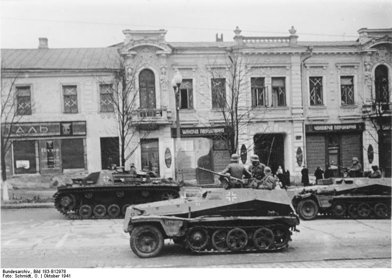 An der Sowjetfront: Panzerspähwagen und Sturmgeschütze patroulieren in den Strassen von Charkow. PK-Aufnahme: Kriegsberichter: O.Schmidt русский: Улица Свердлова (?) в Харькове. Октябрь 1941, первые дни оккупации. 9956-41 "Fr." "Fr.OKW" Okt.41